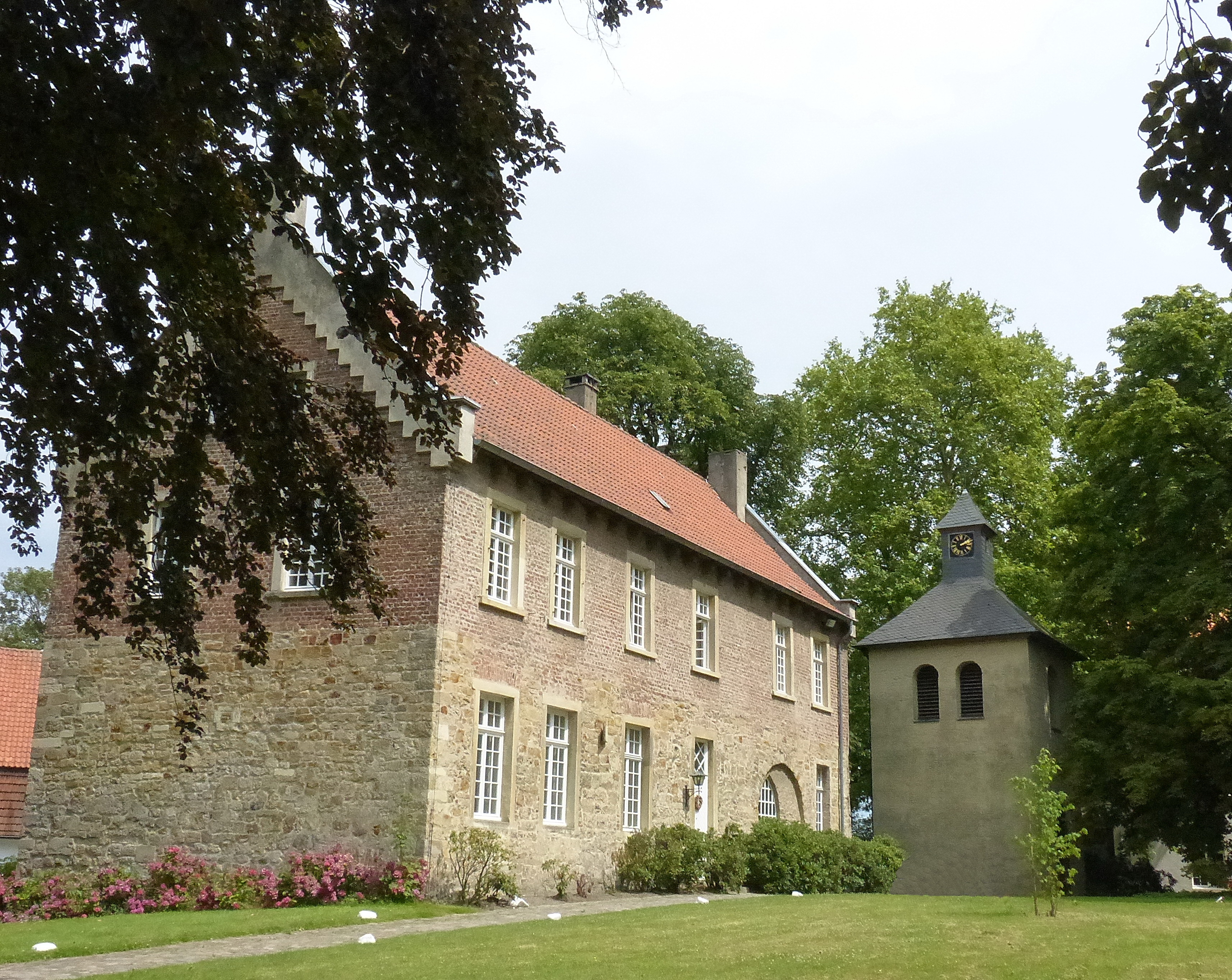 Altes Pastorat und Glockenturm der Stiftskirche im Park von Schloss Cappenberg This is a photograph of an architectural monument.It is on the list of cultural monuments of Selm